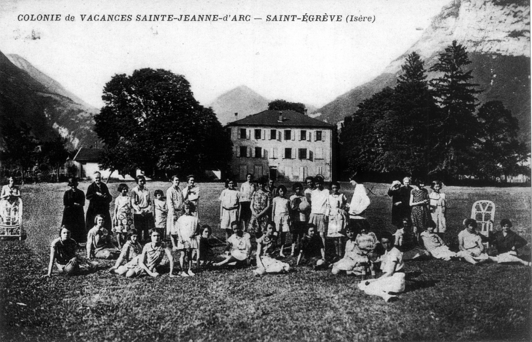 Saint-Égrève, colonie de vacances Sainte-Jeanne-d'Arc, une des premières colonies en région Rhône-Alpes